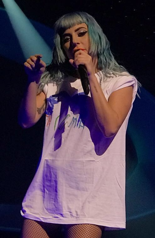 Enigma+Jazz